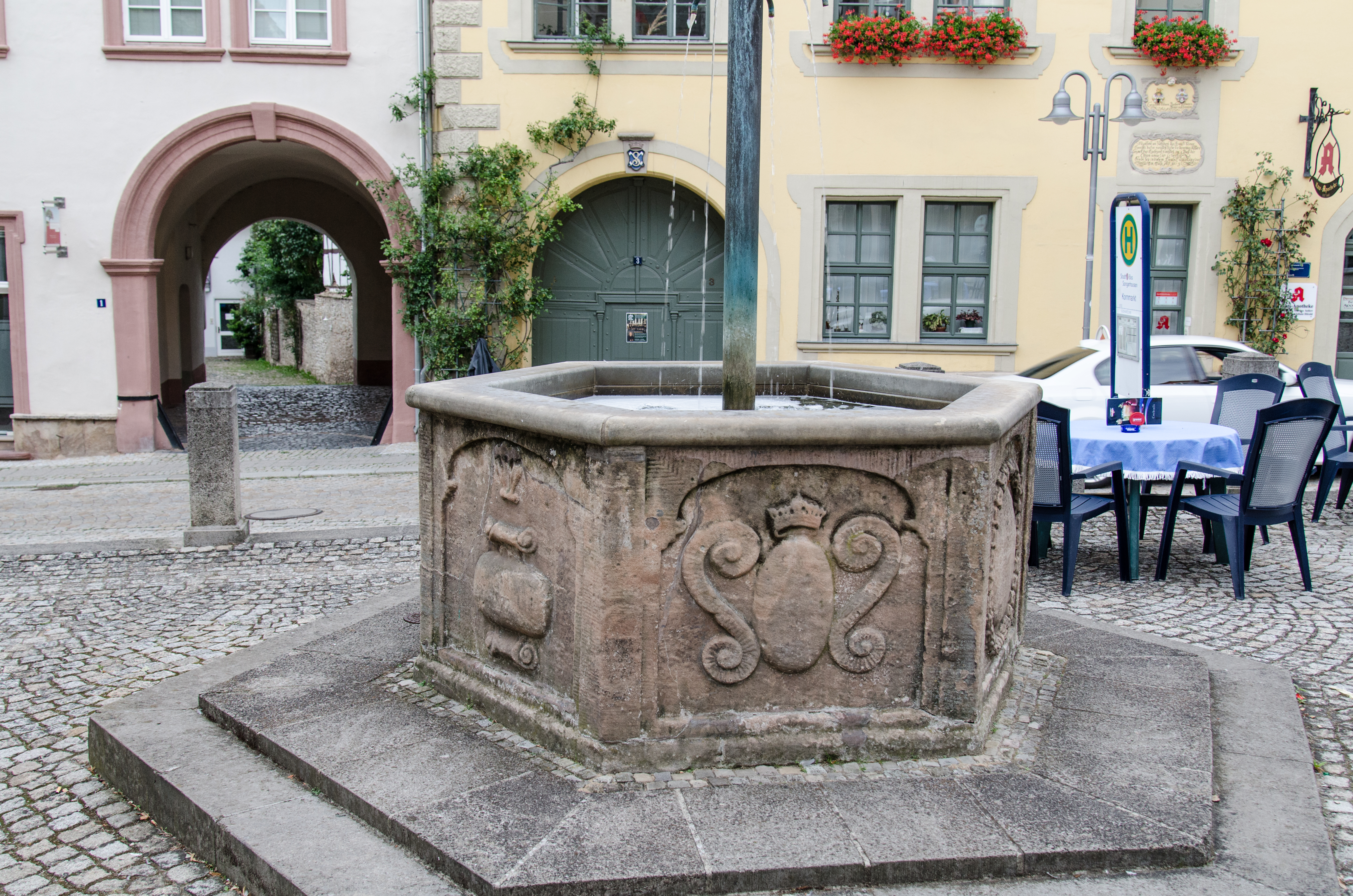 Sangerhausen, Kornmarkt, Brunnen